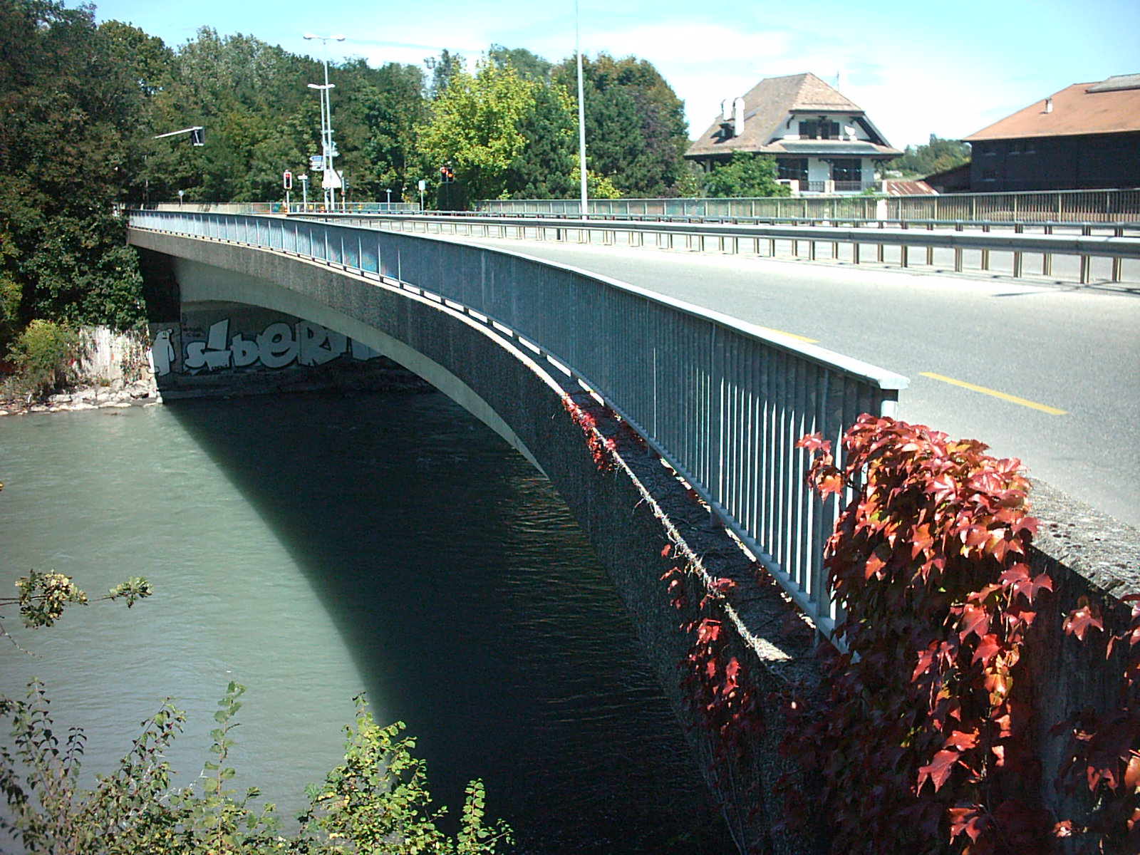 Pont de Sierne à Genève (Suisse)